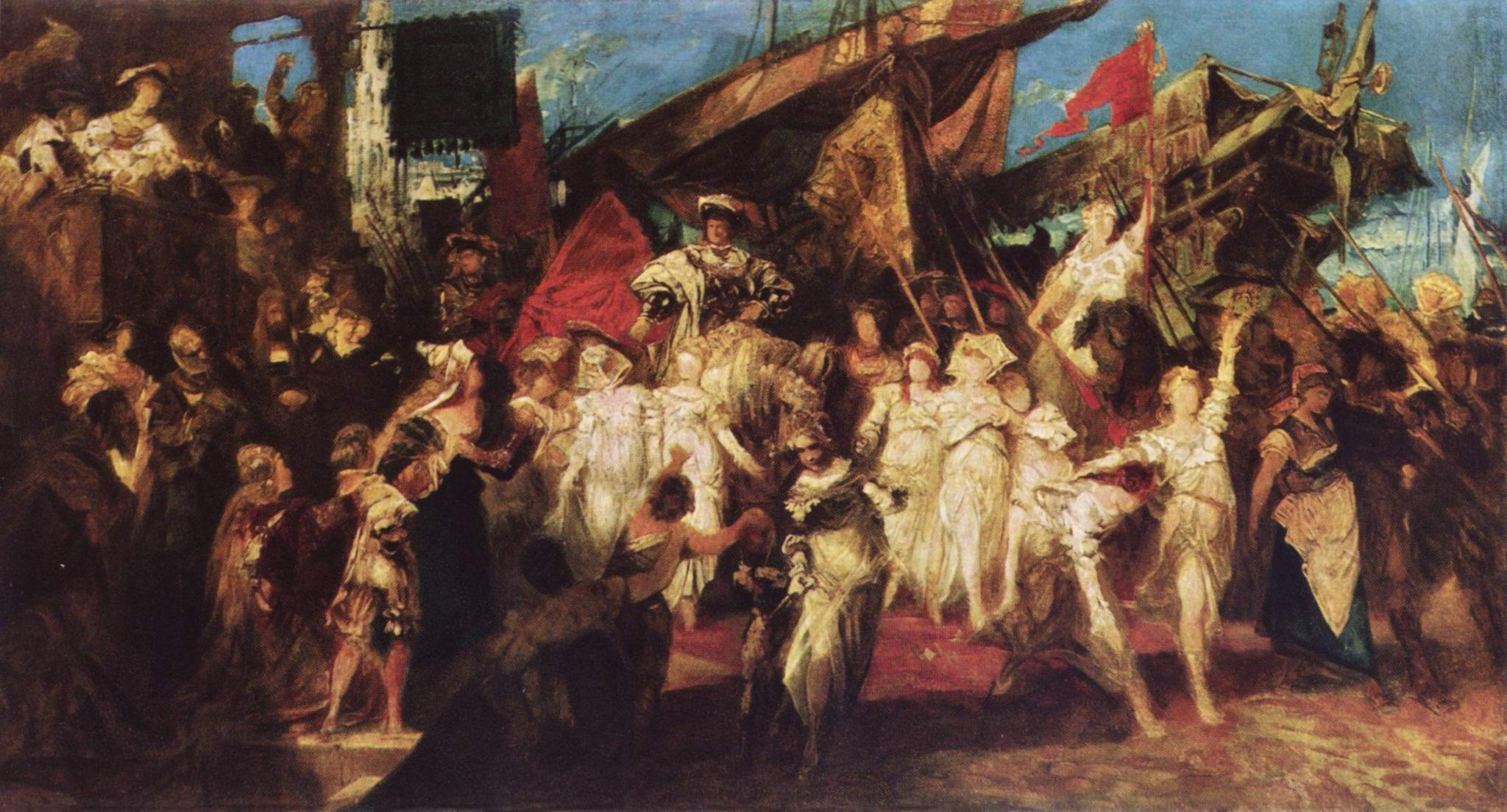 sketch